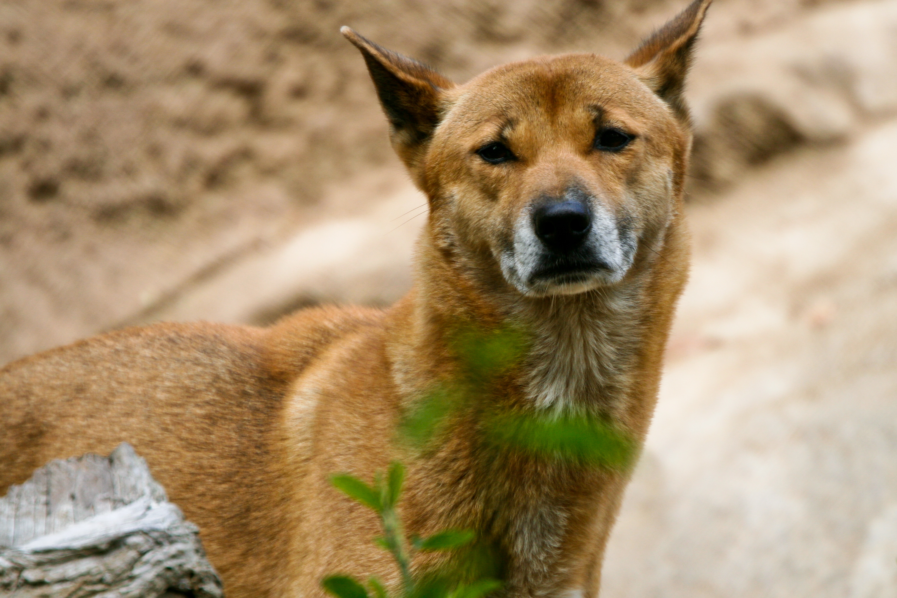 New Guinea Singing Dog at San Diego Zoo